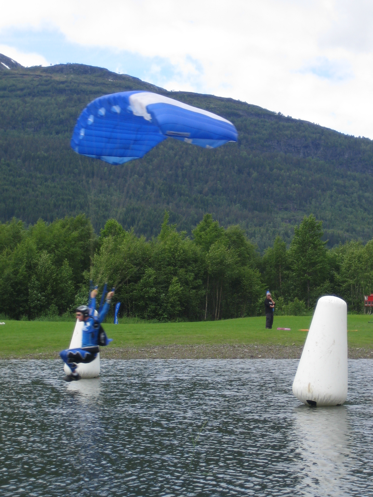 En fra Preformance Design laget som svooper over en dam ved ekstremsportveko på Voss 2005.